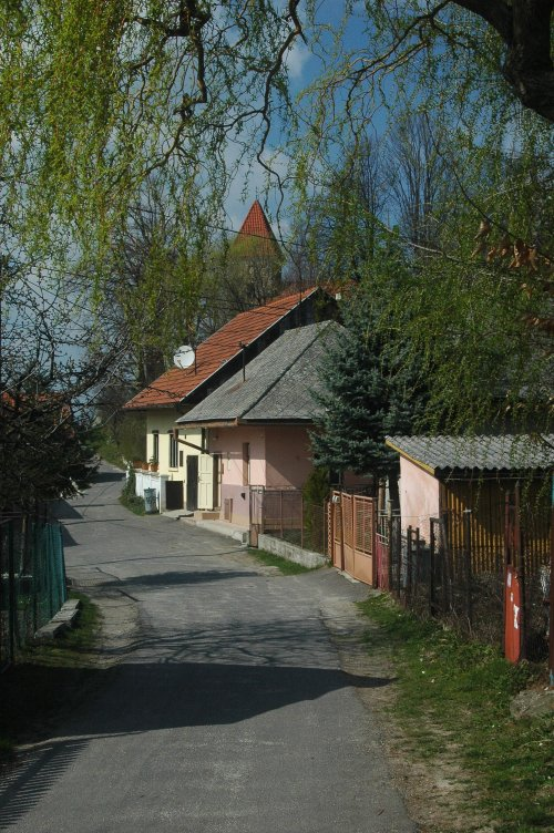 Cigeľ, street